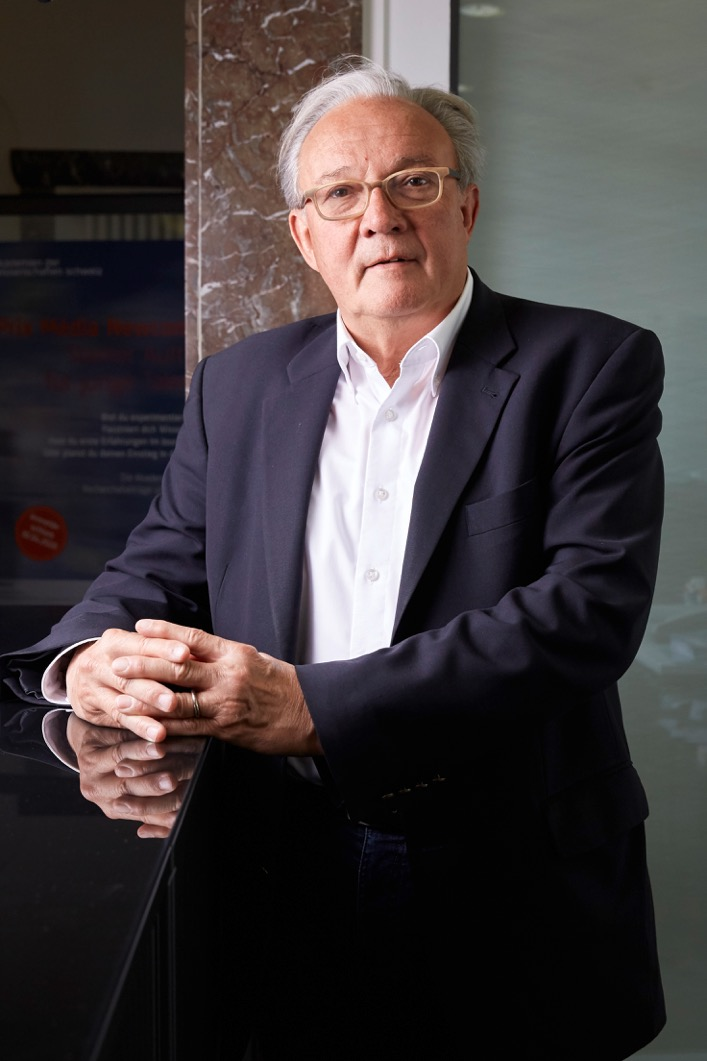 Marcel Tanner 2020. Fotografiert von Annette Boutellier.